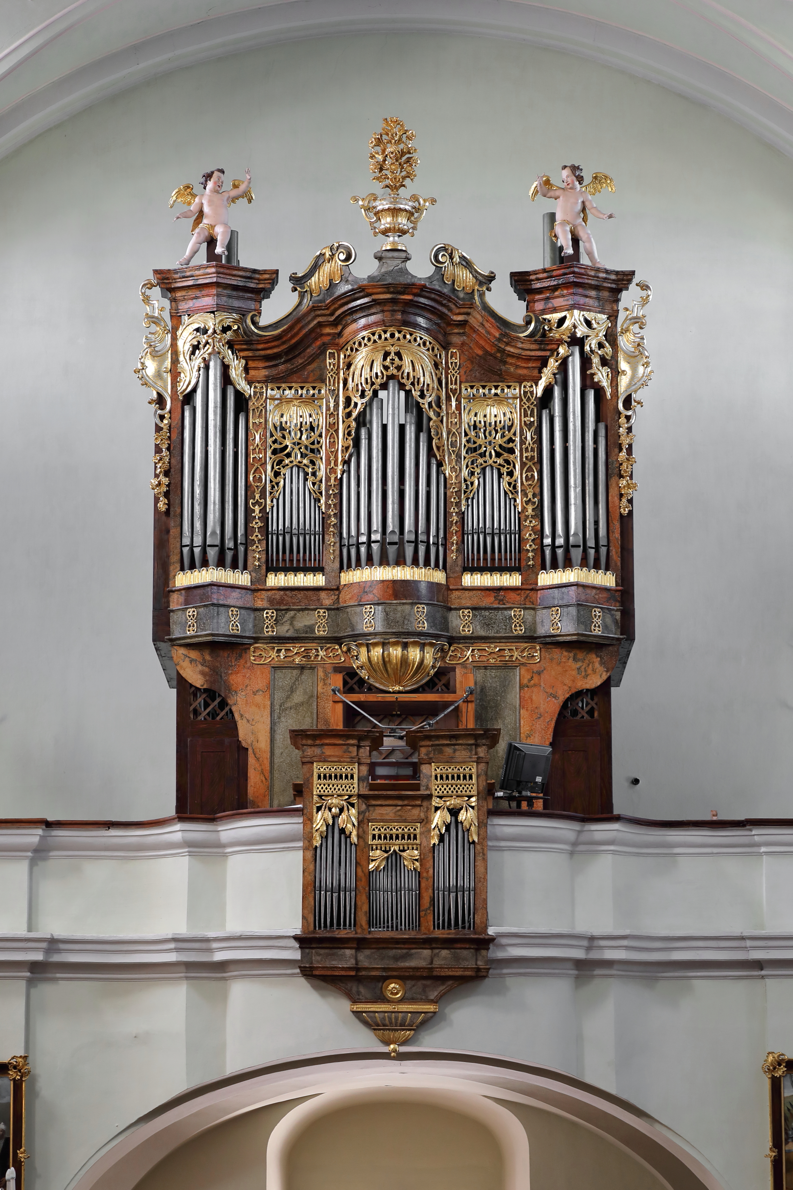 Die Orgel der röm.-kath. Pfarrkirche hl. Lorenz in der niederösterreichischen Marktgemeinde Loosdorf. Die Orgel mit 2 Manualen und 17 Registern aus dem Jahr 1893 ist ein Werk von Konrad Neusser, der das bestehende barocke Gehäuse wiederverwendete und teilweise ergänzte. Im Jahr 2012 wurde sie generalsaniert und der ursprüngliche Zustand (Register) wieder hergestellt.